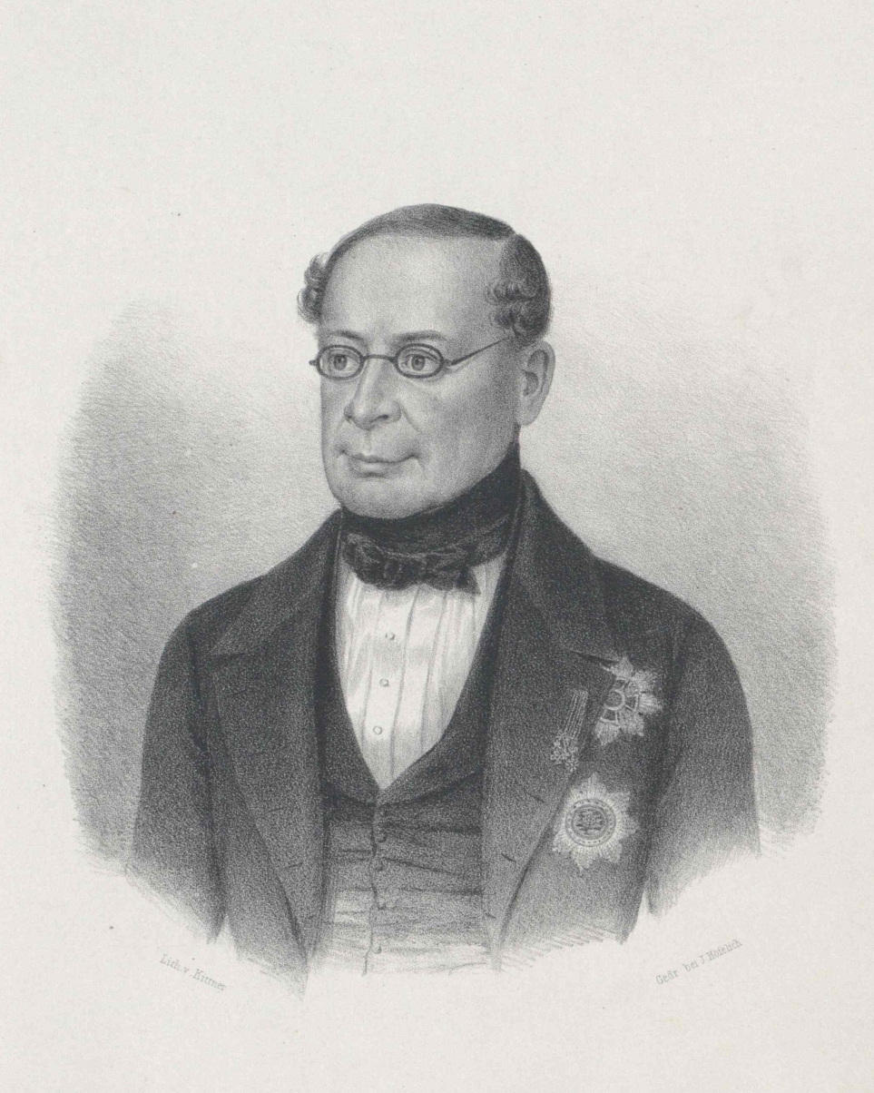 Alois hrabě Ugarte (1784–1845)